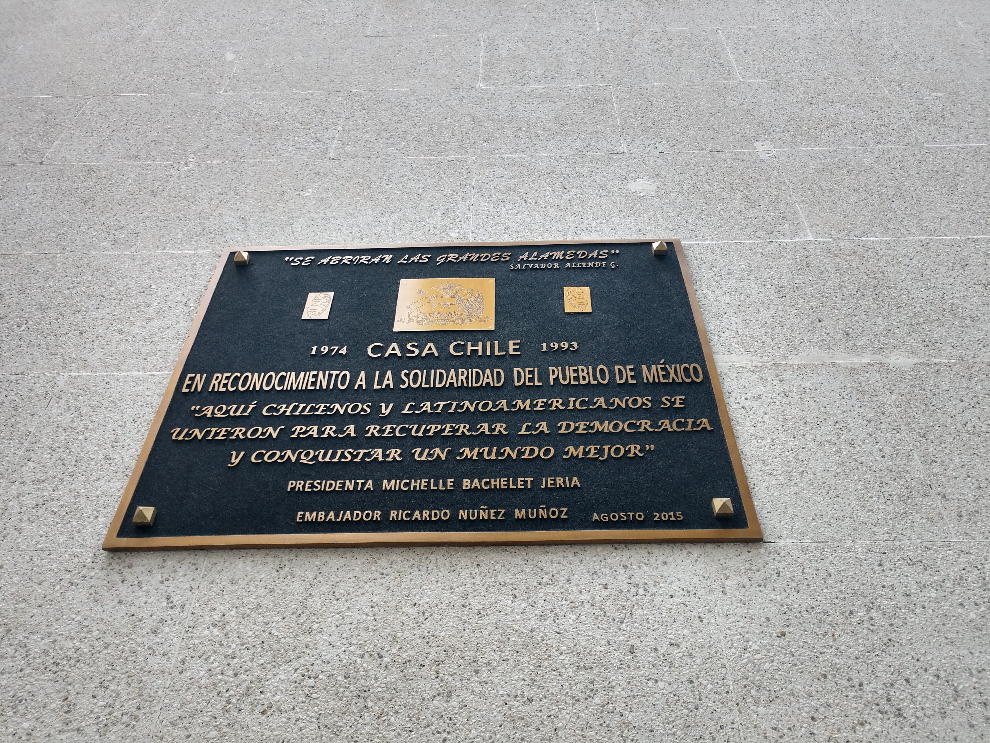 Placa conmemorativa del la Casa de Chile en México.